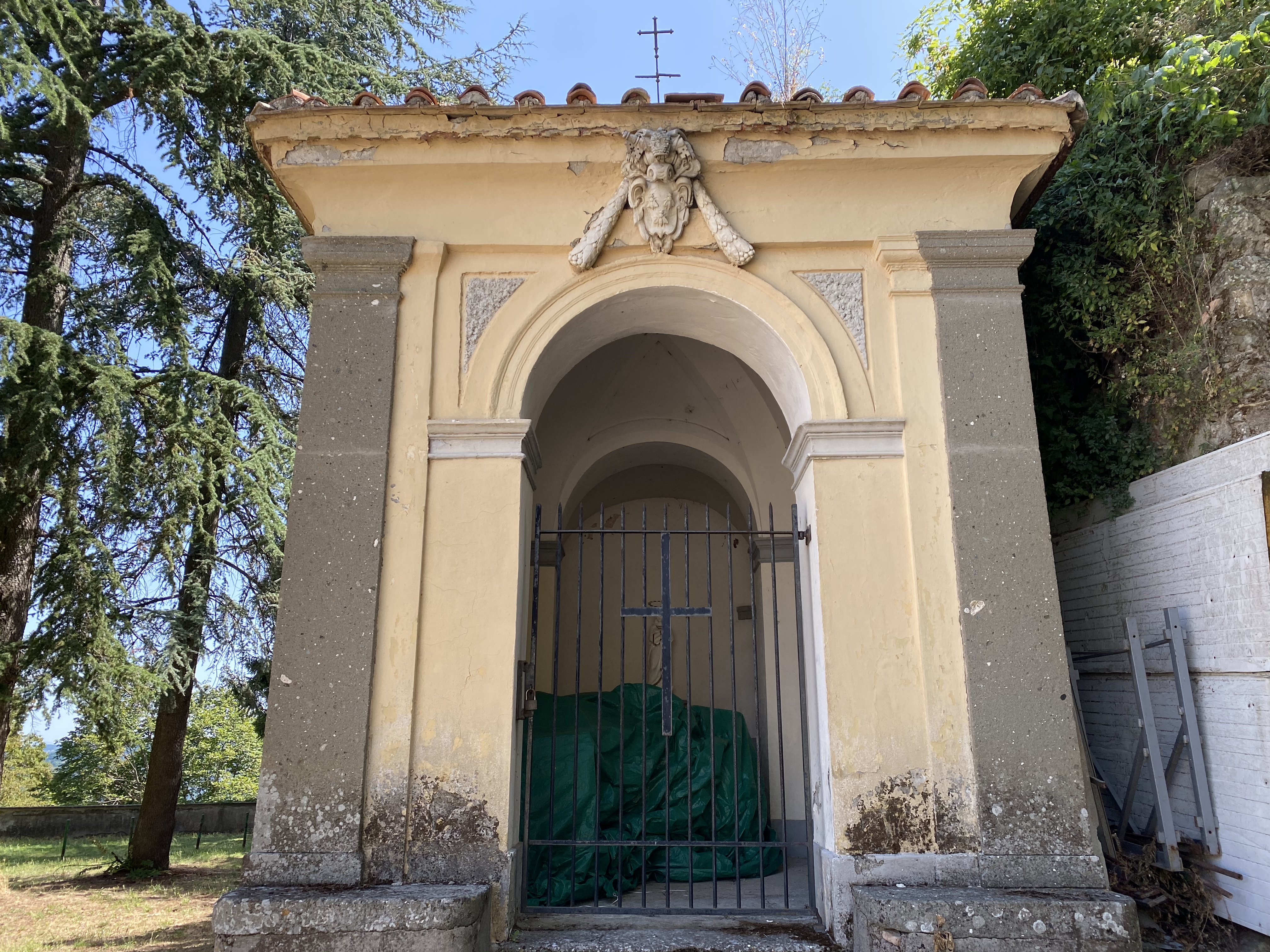 Cappella dell’Orazione all’Orto nel giardino del convento dei Cappuccini di Albano Laziale